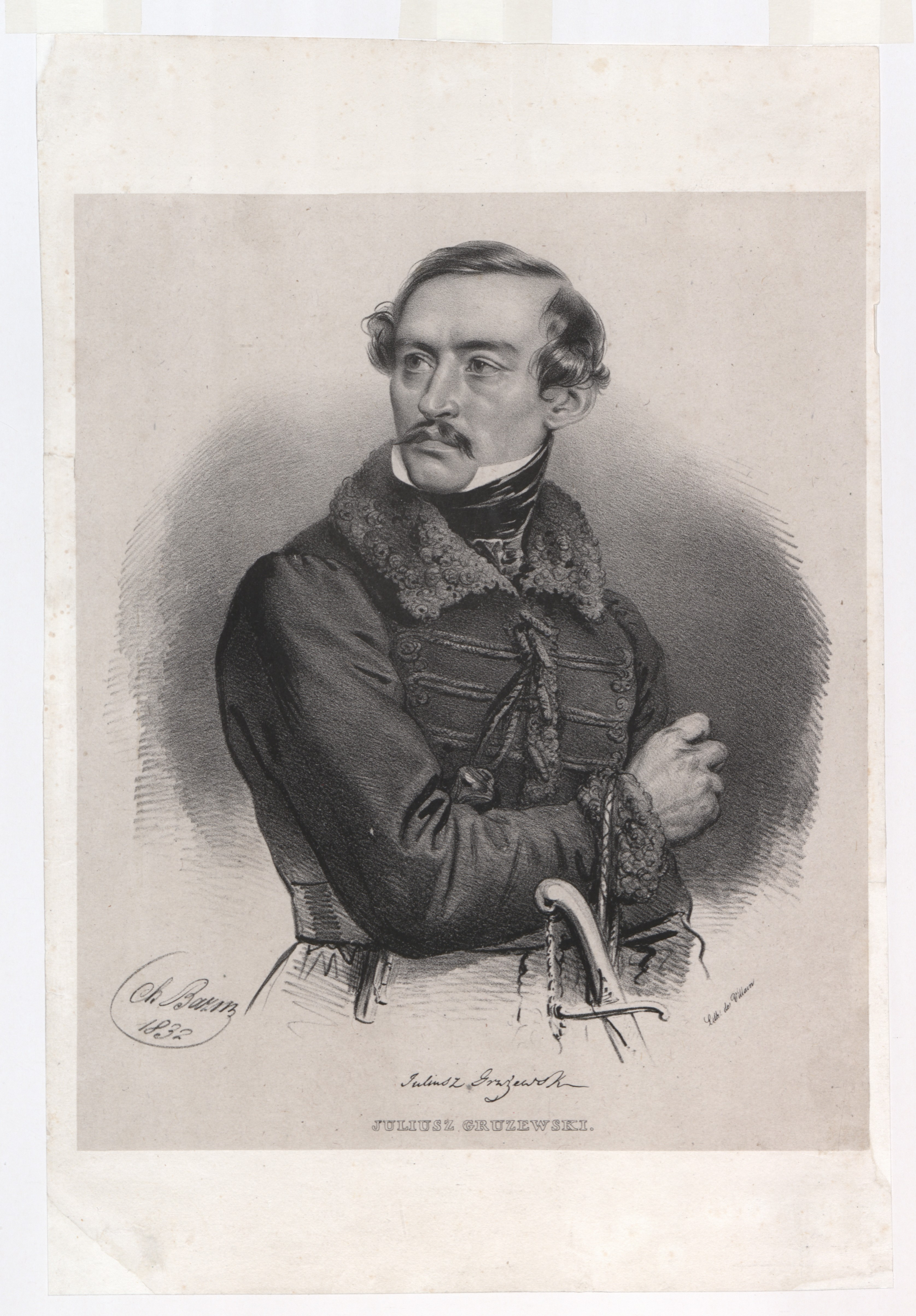 Juliusz Grużewski